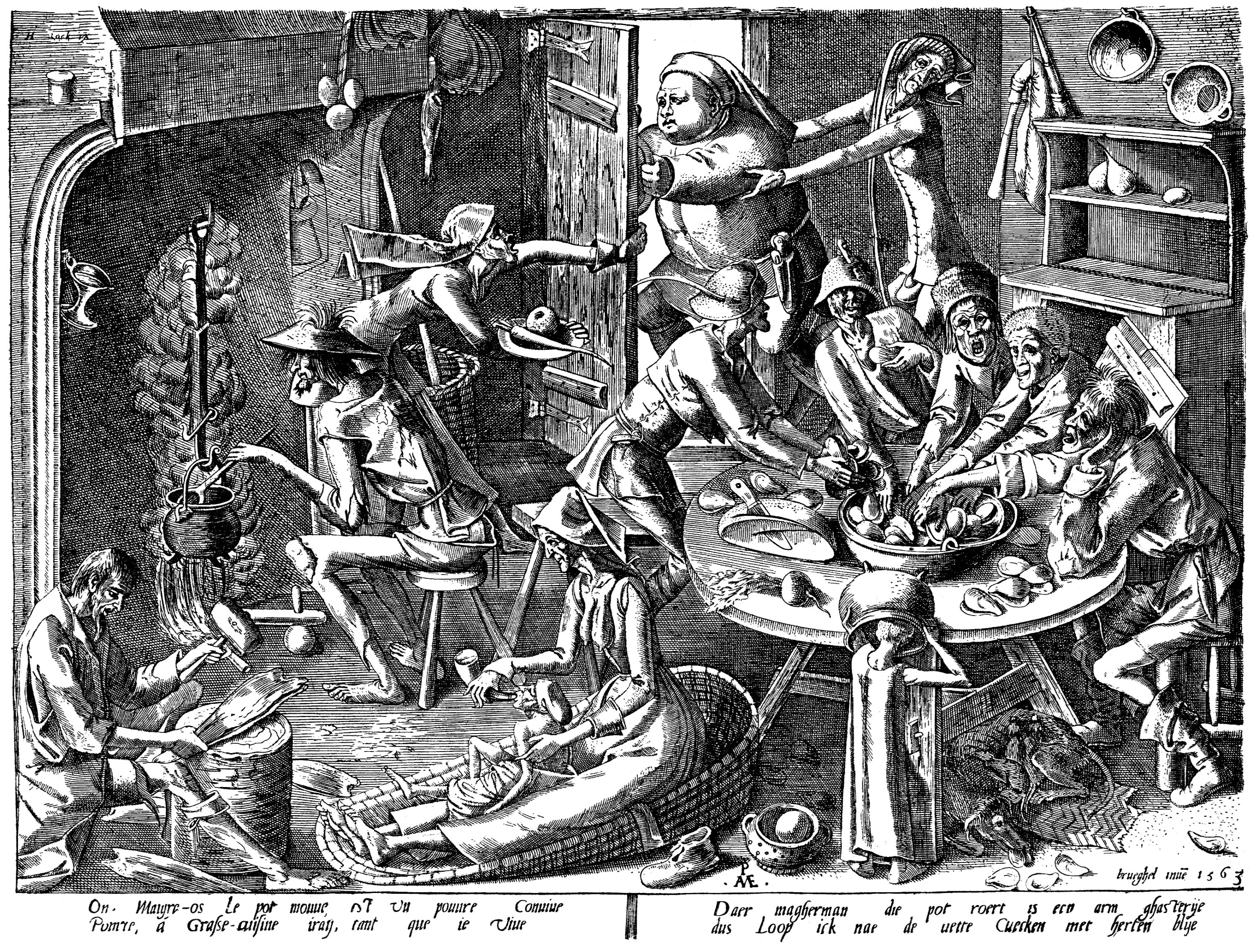 Pieter Brueghel der Ältere: Die magere Küche, (1563), 22,5 × 29 cm, Kupferstich, Bibliothèque Royale, Cabinet Estampesin Brüssel